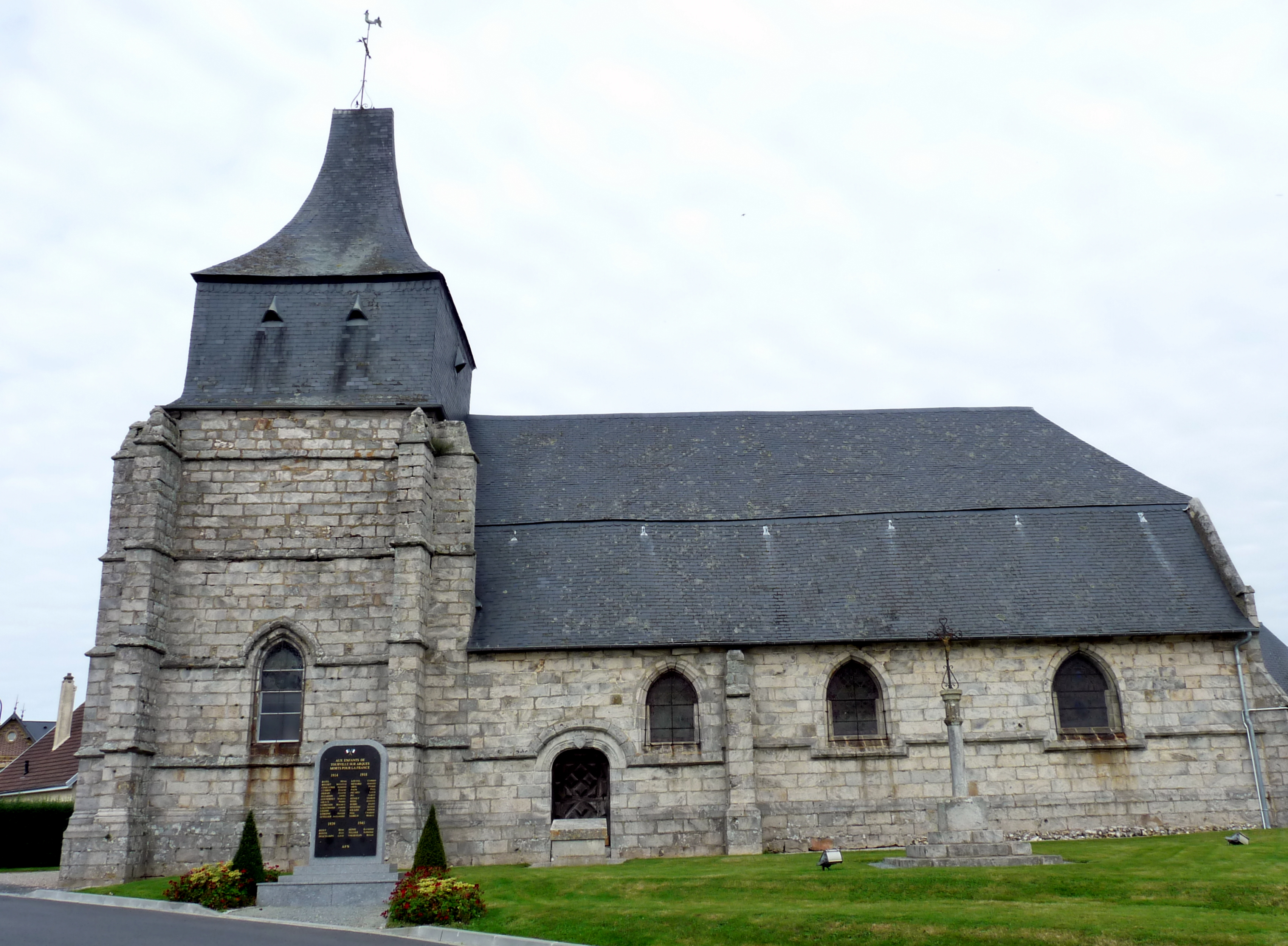 Église Saint-Martin de Tourville-sur-Arques (Inscrit) .